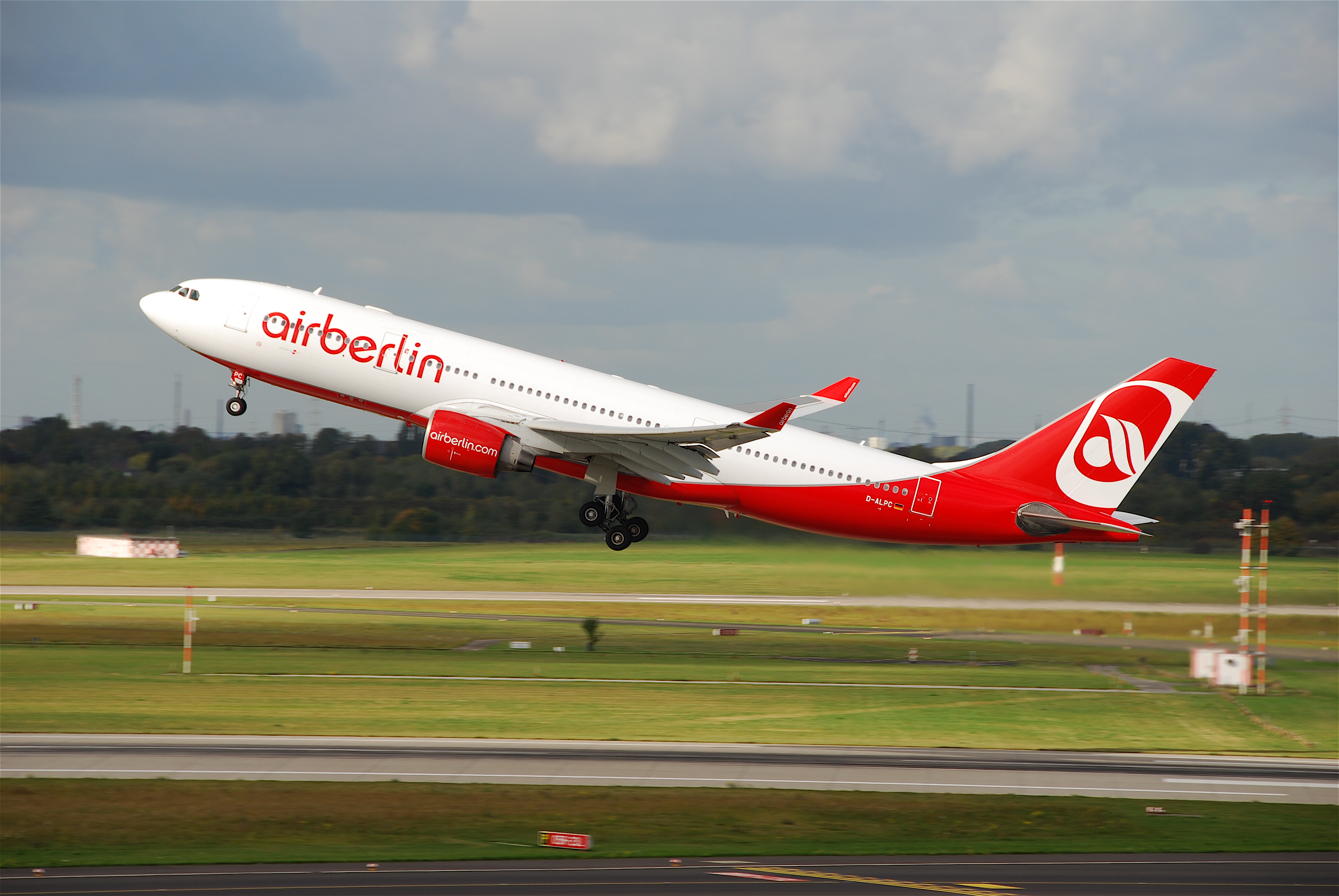 D-ALPC@DUS;13.10.2009/558ln